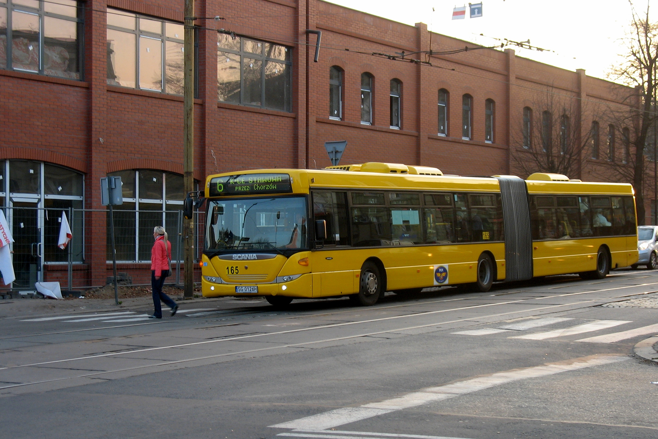 Zabrze, ulica Brysza. Nowa Scania CN280UA PKM Gliwice.